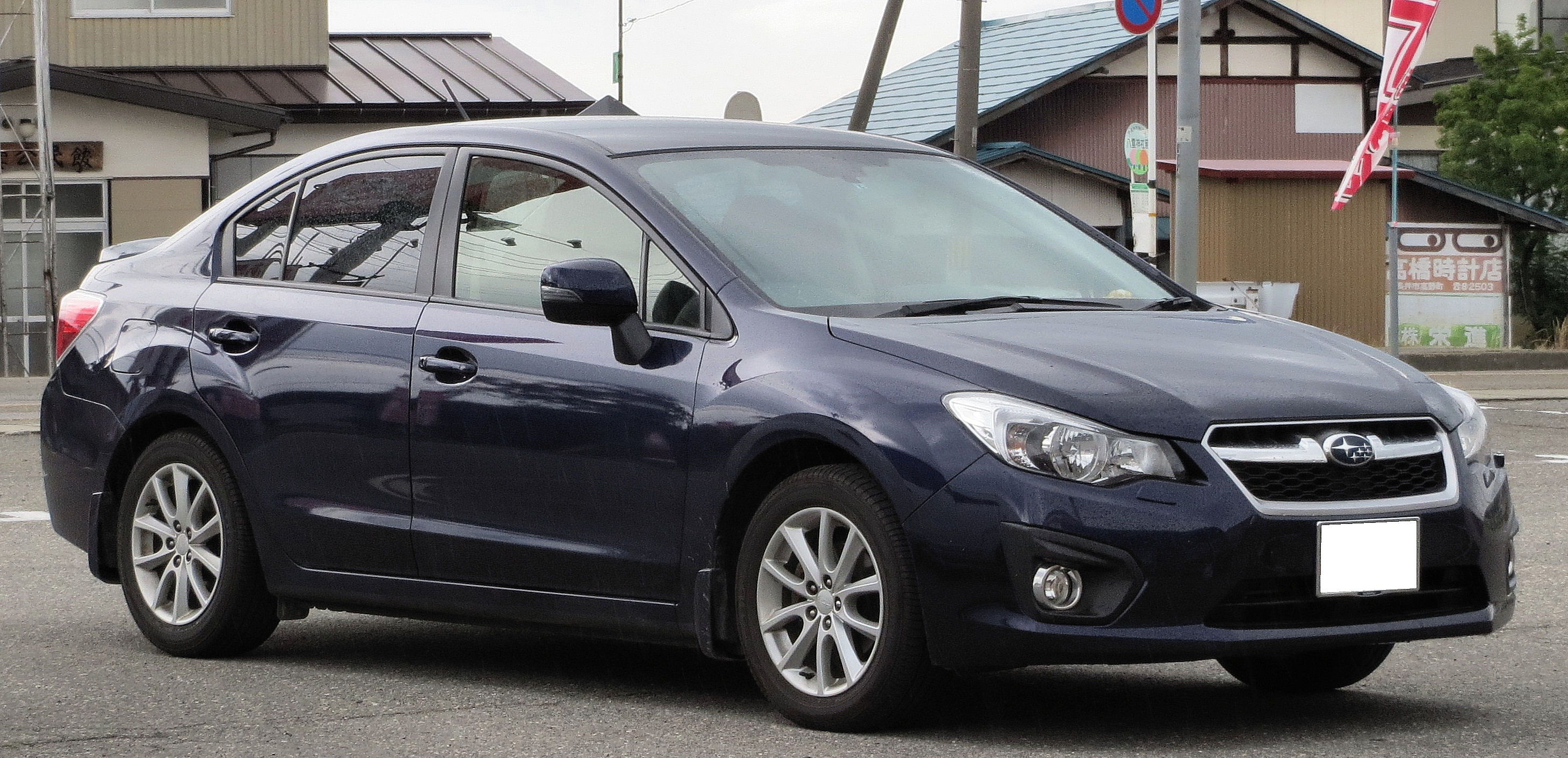 スバルインプレッサG4 2.0i AWD